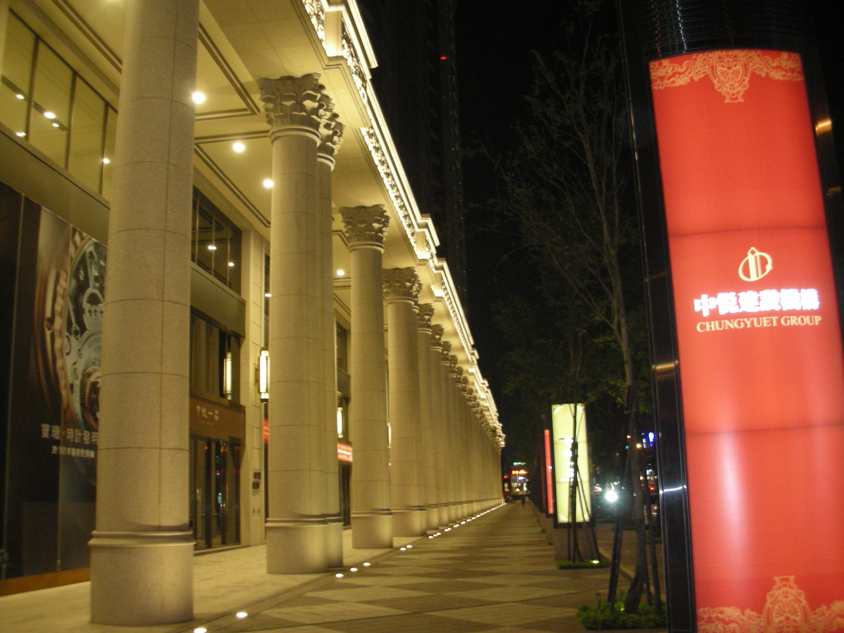 中悅一品前